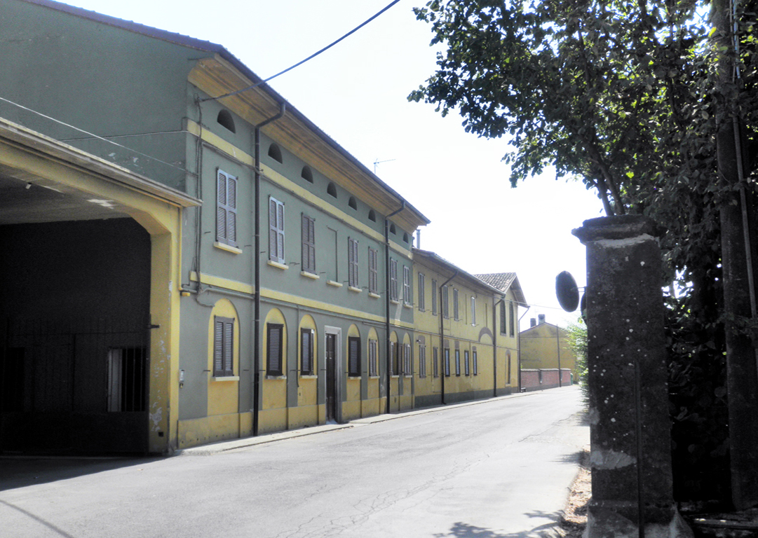 La località Ceppeda nel comune di Ossago Lodigiano